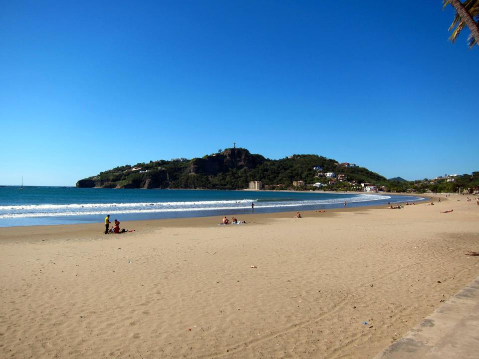 Bahia de San Juan del Sur en Nicaragua